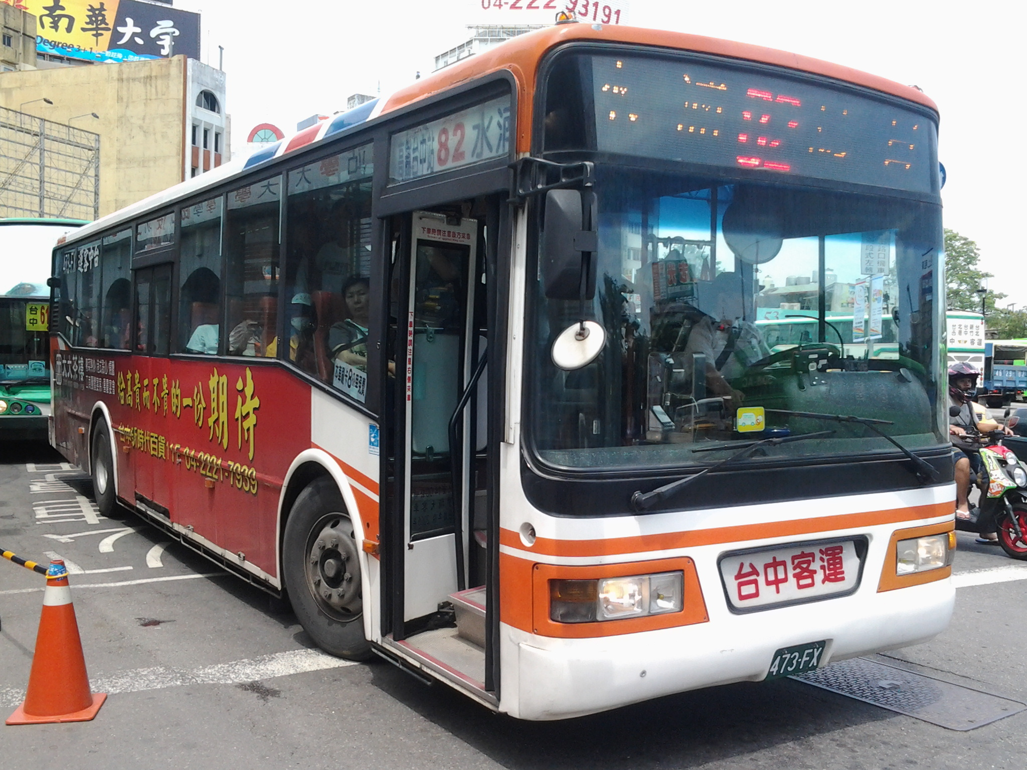 2005〈2012〉 HINO ERK2JRL（固特）